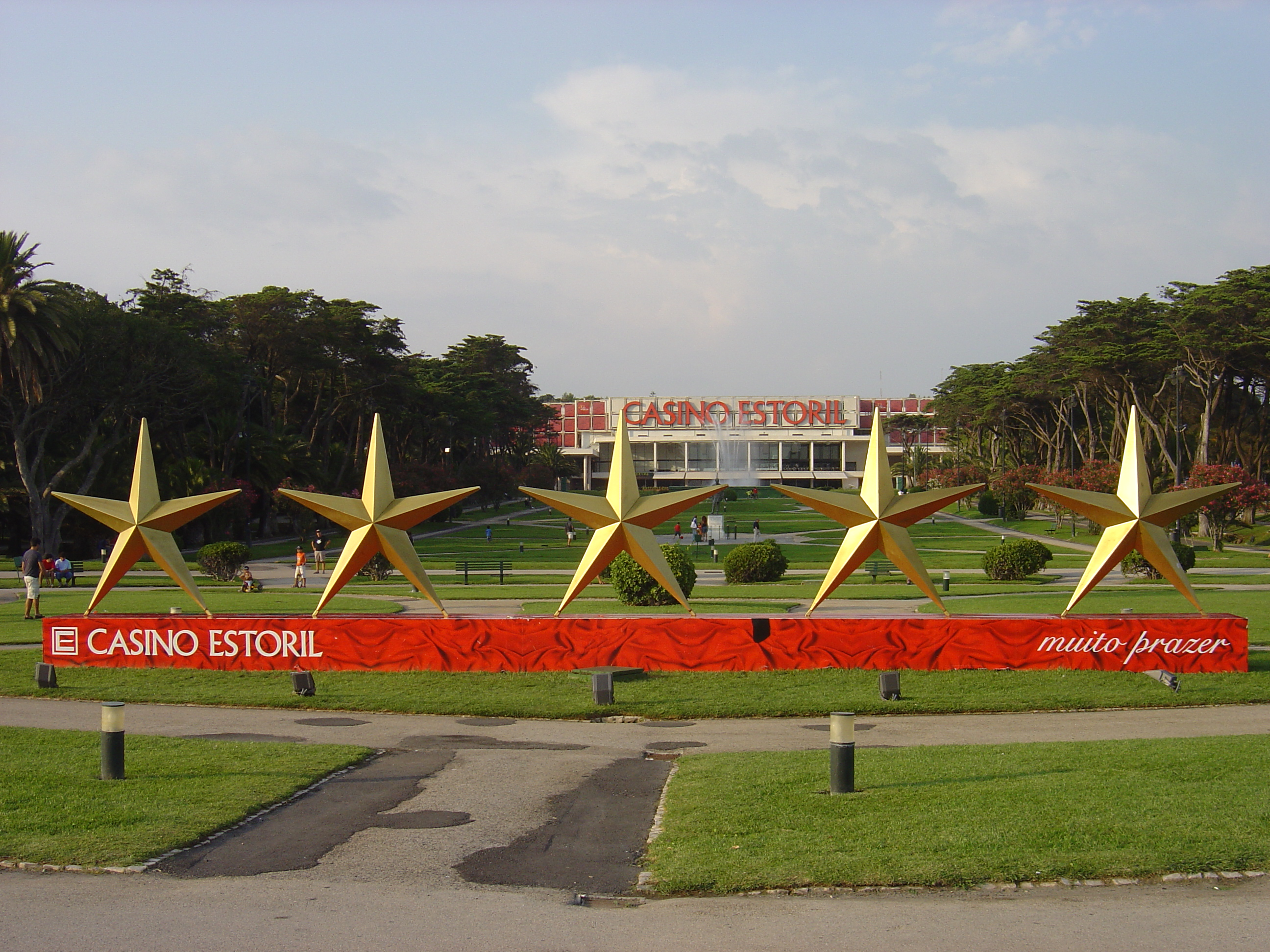 Casino Estoril, Portugal